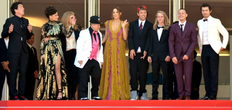 Présentation du film "American Honey" au festival de Cannes